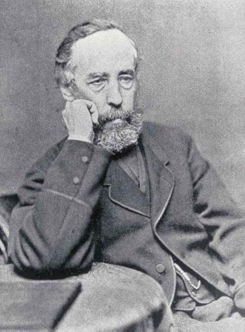 Científico escocés del siglo XIX.